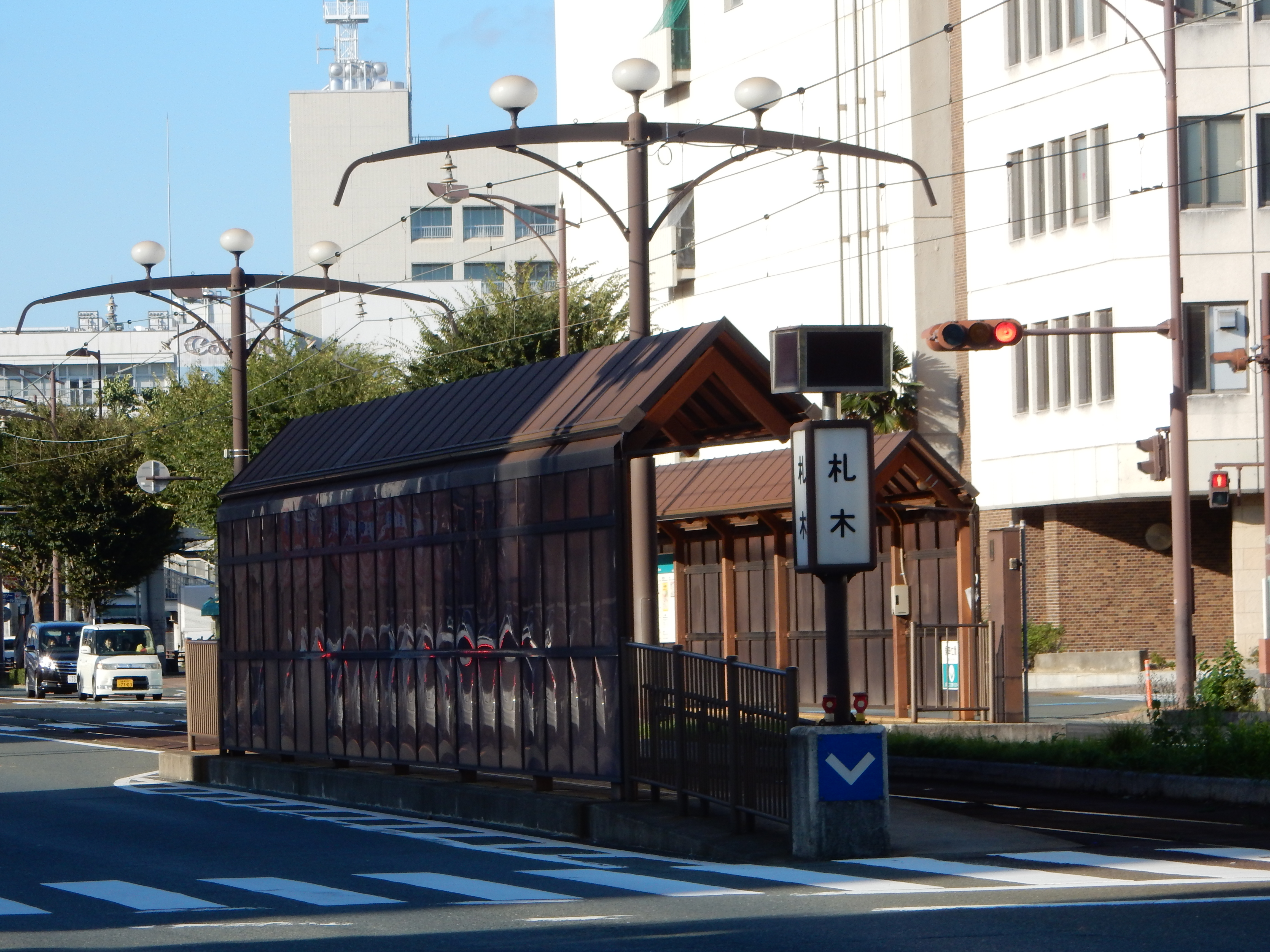 札木停留場。愛知県豊橋市札木町・魚町